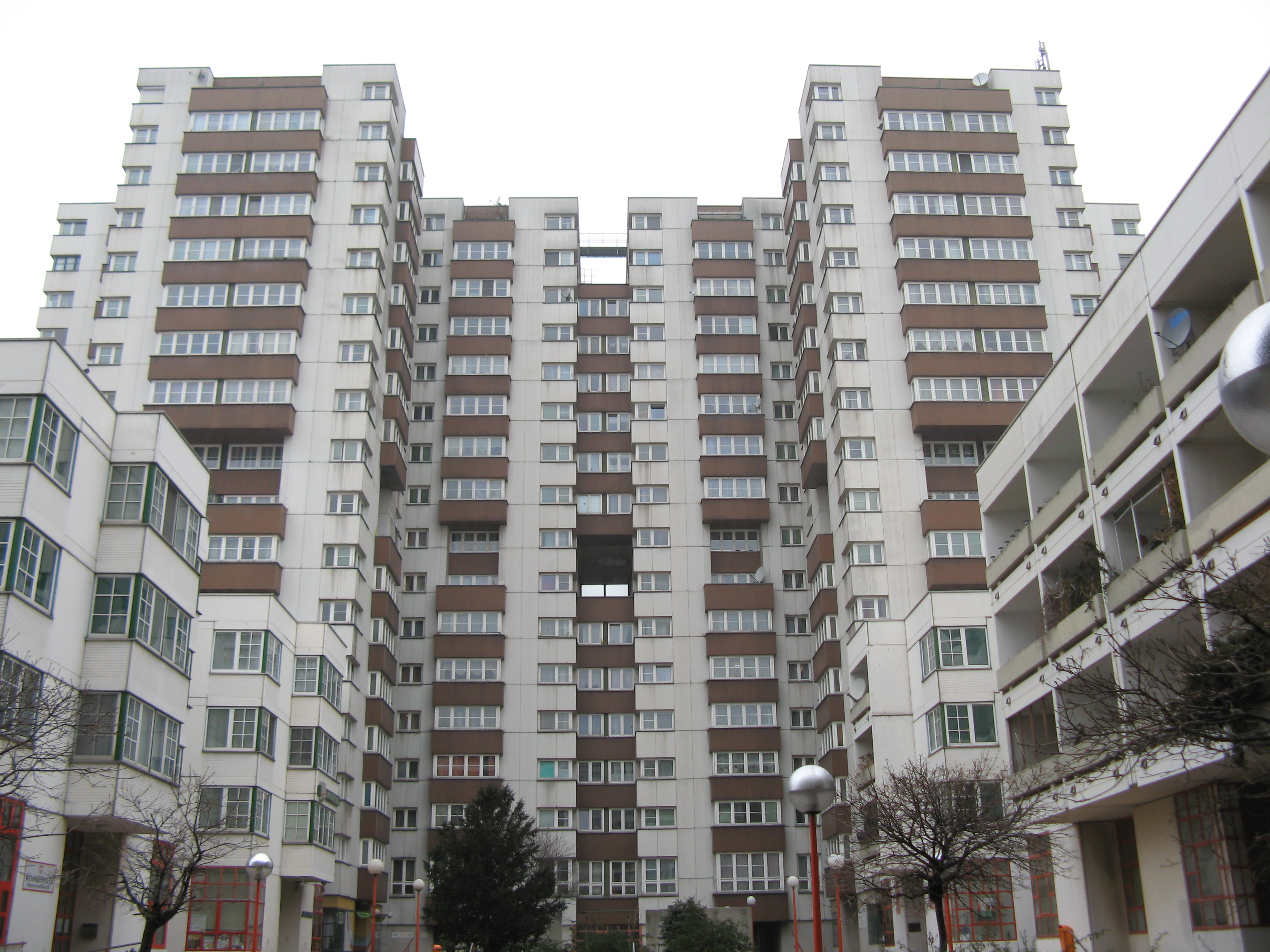 Wohnhausanlage Am Schöpfwerk (1976-80) von Viktor Hufnagl in Wien-Meidling